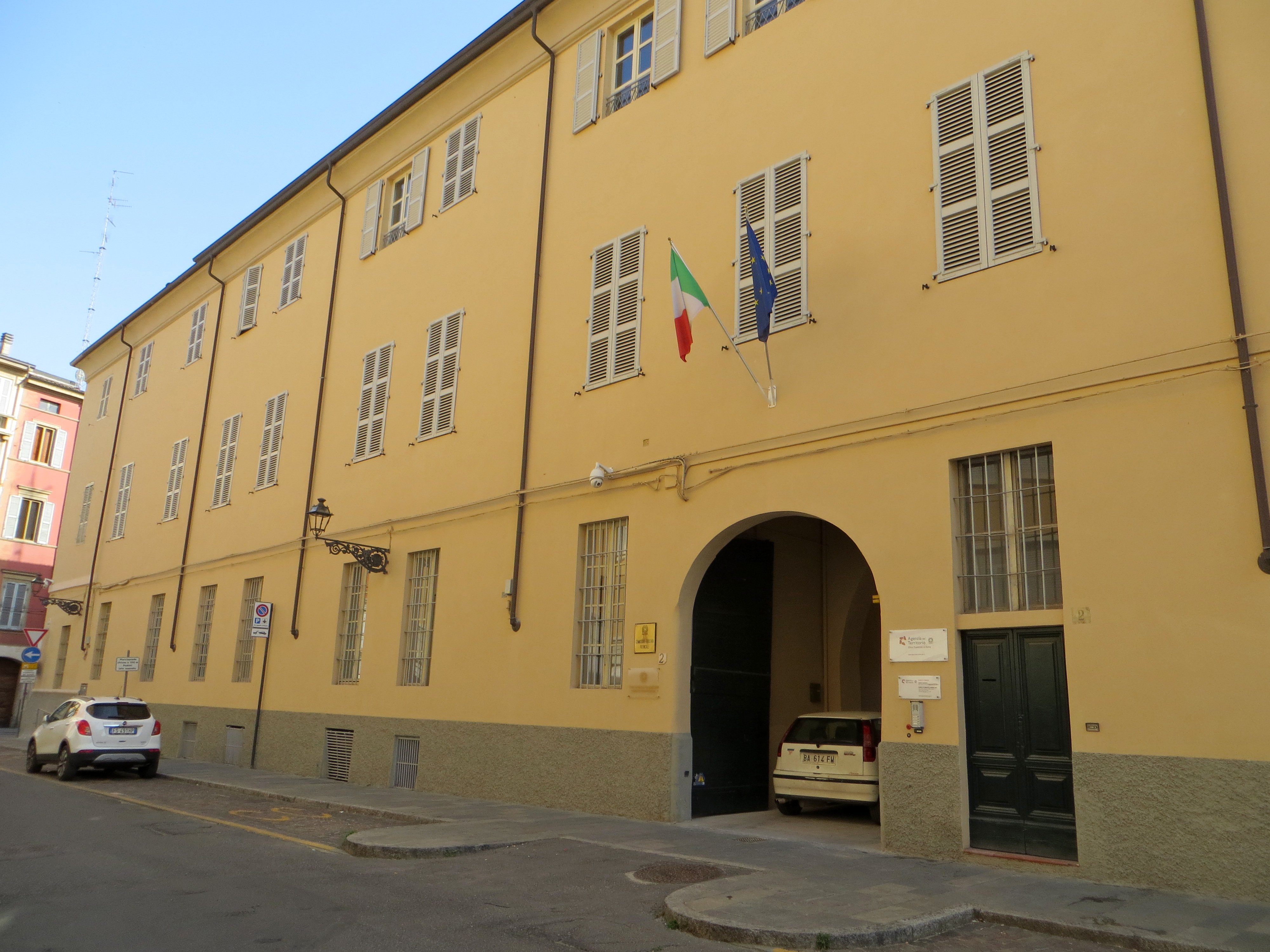 Palazzo dell'Intendenza di Finanza (Parma) - lato nord-est